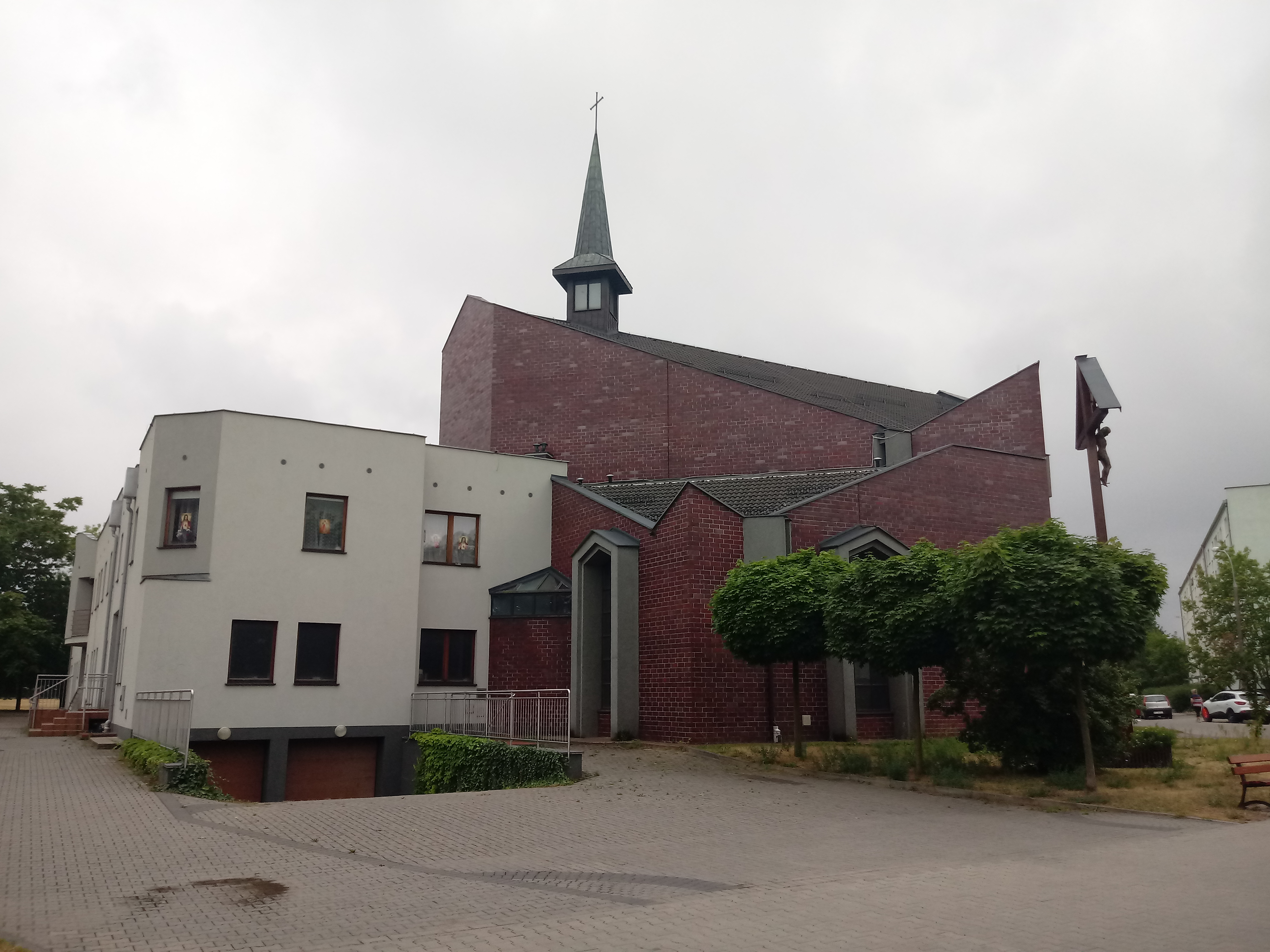 Plebania i kościół Chrystusa Najwyższego Kapłana w Poznaniu, os. Lecha